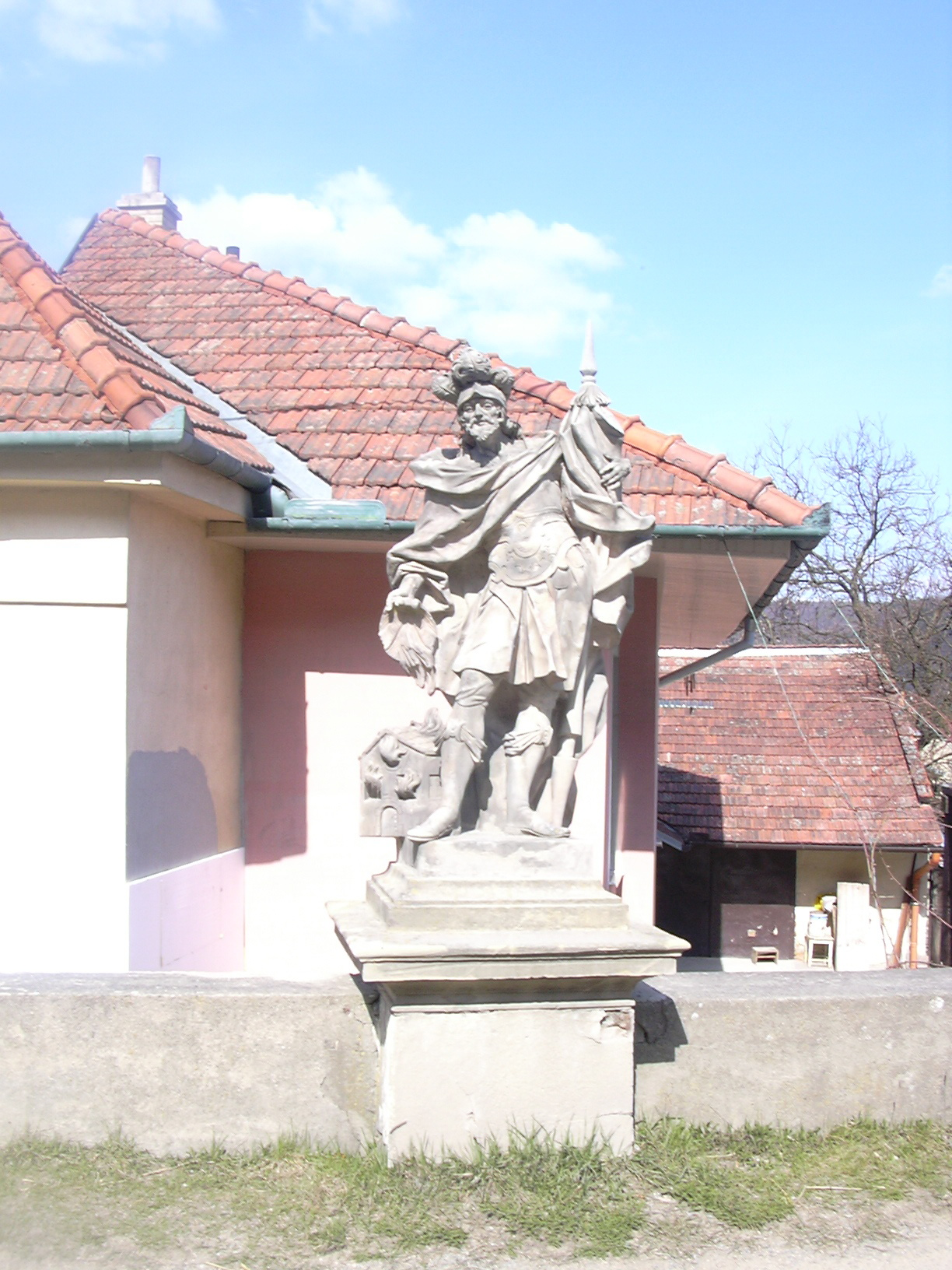 Svatý Florián, Račice, Vyškovský region, Česká republika